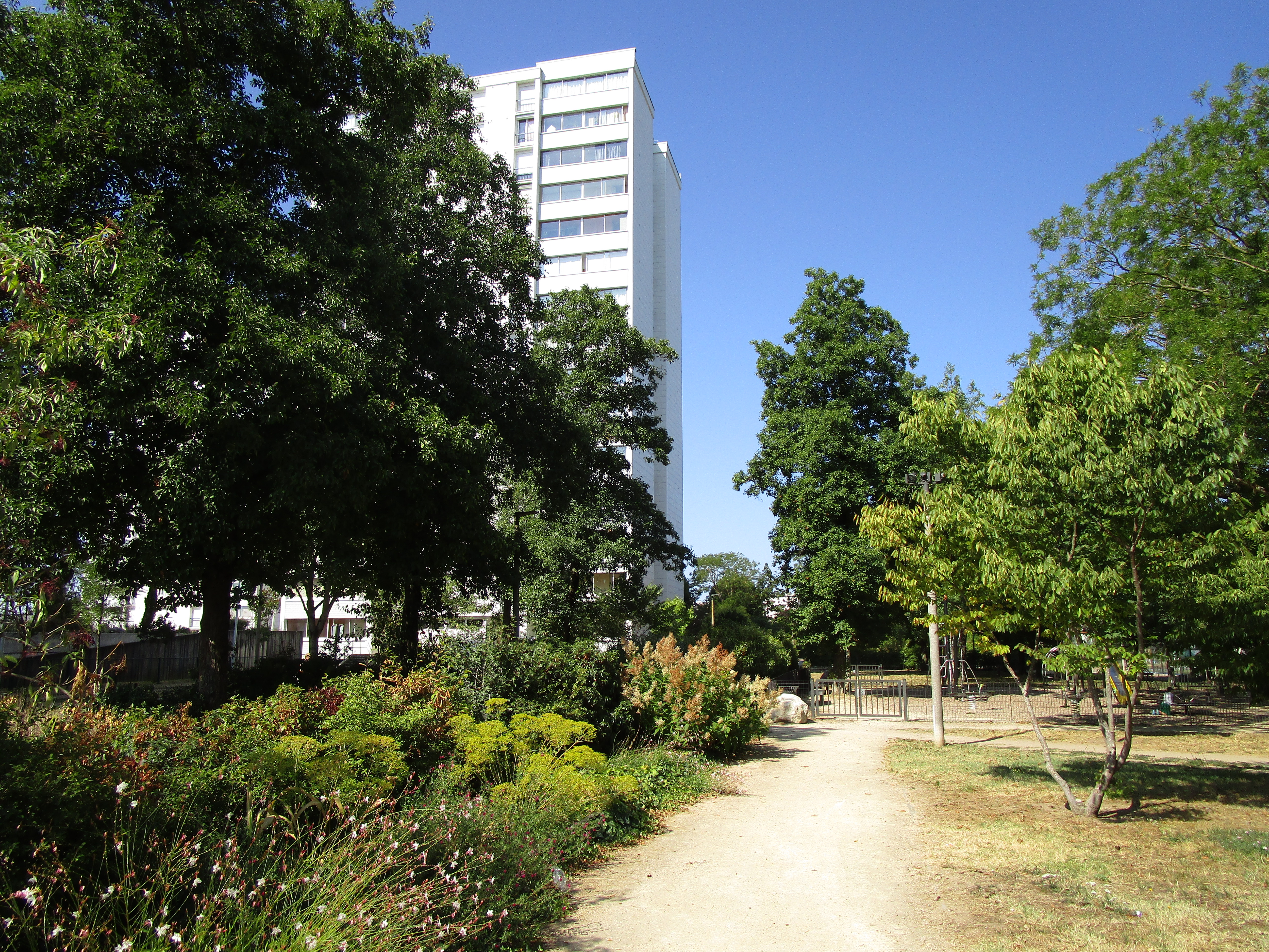 Le Grand Mail de quartier de la Rabaterie, commune de Saint-Pierre-des-Corps.